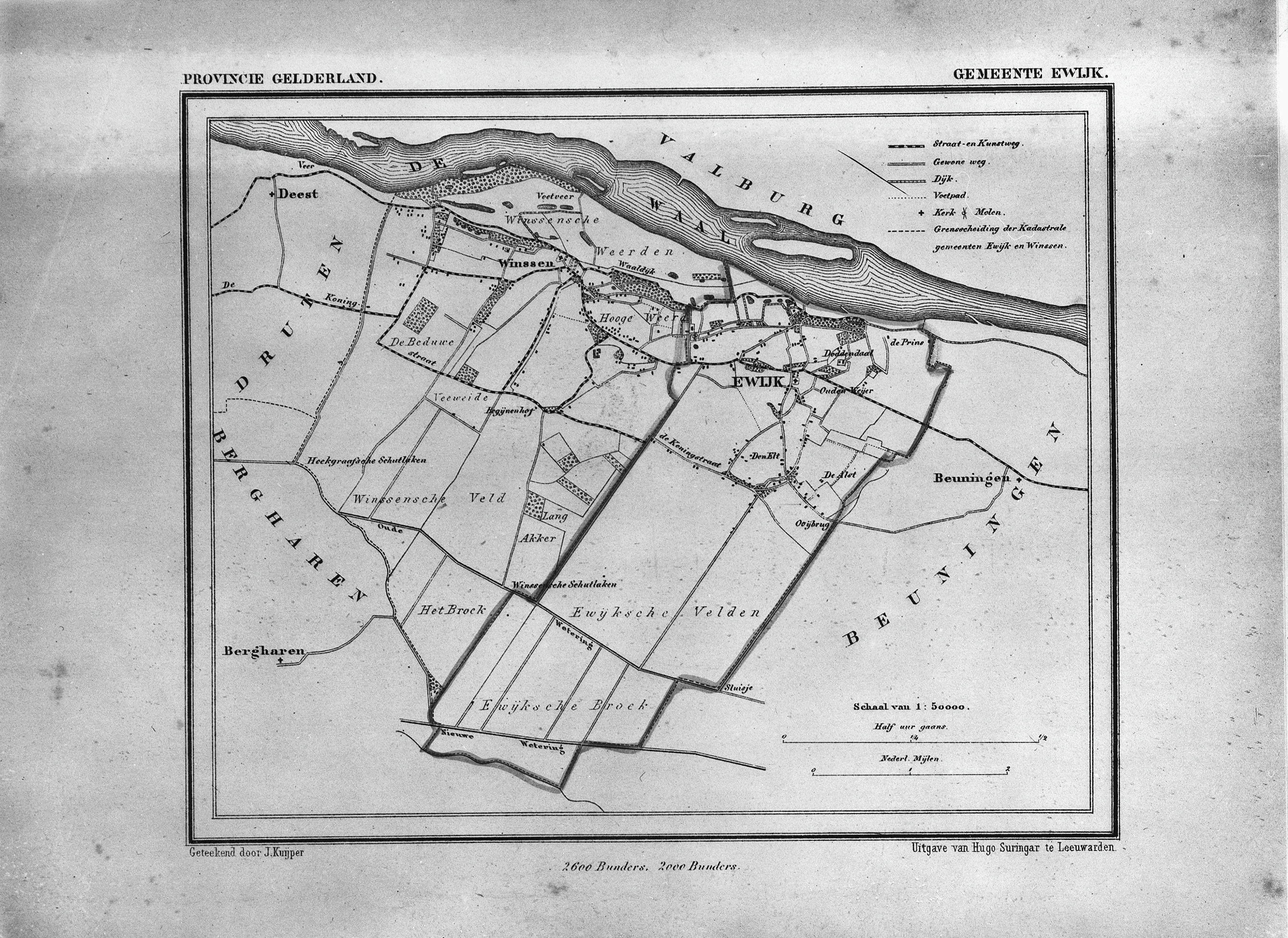 Plattegrond/ Kaart: Kaart van Ewijk en omgeving (opmerking: Kaart getekend door J. Kuyper)